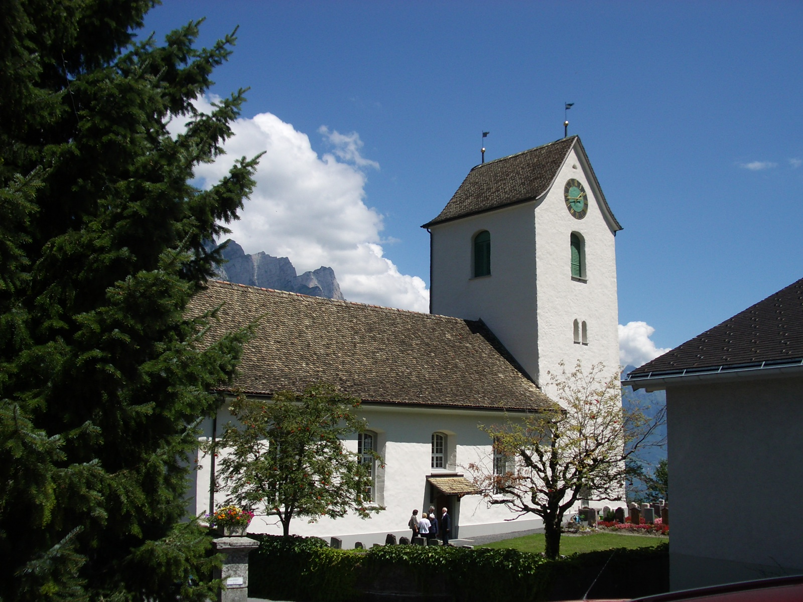 Kirche, Obstalden GL, Schweiz